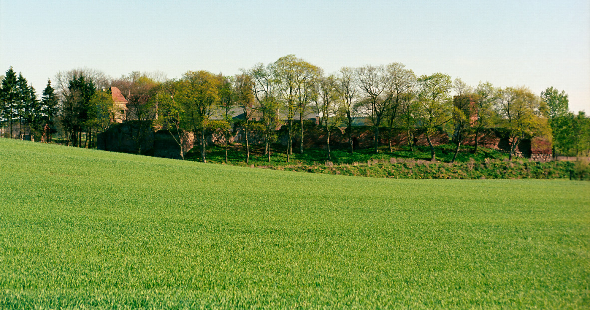 Stara Kiszewa, zamek kiszewski